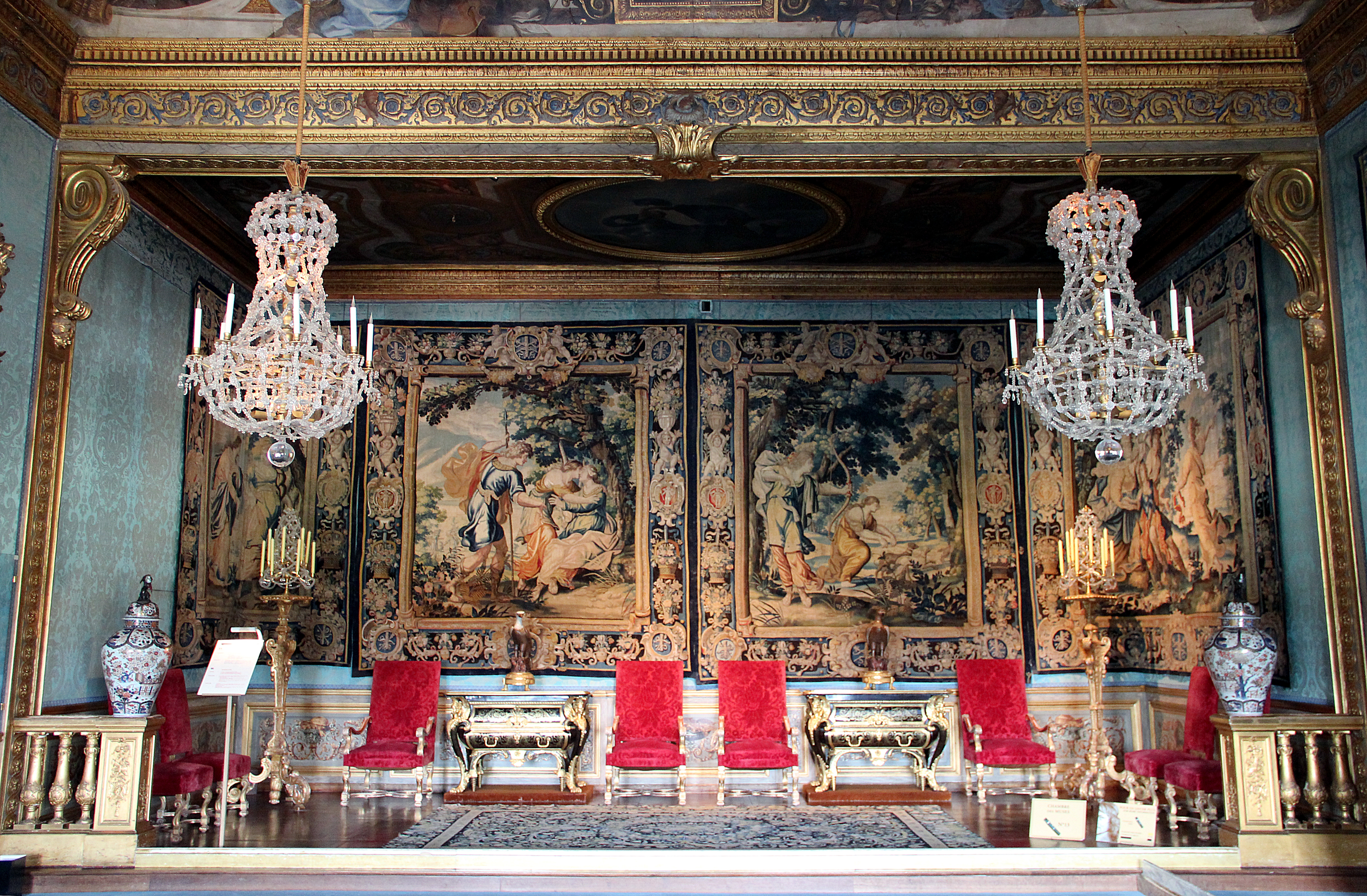 Deux des cinq tapisseries faisant partie de la célèbre tenture « Aminte et Sylvie » tissées vers 1630 par les ateliers du faubourg Saint-Marcel à Paris d’après les cartons de Claude Vignon, et les deux commodes « Mazarines » réalisées au XVIIe siècle par André-Charles Boulle, de l’alcôve de la chambres des Muses du Château de Vaux-le-Vicomte - Maincy (Seine-et-Marne, France).